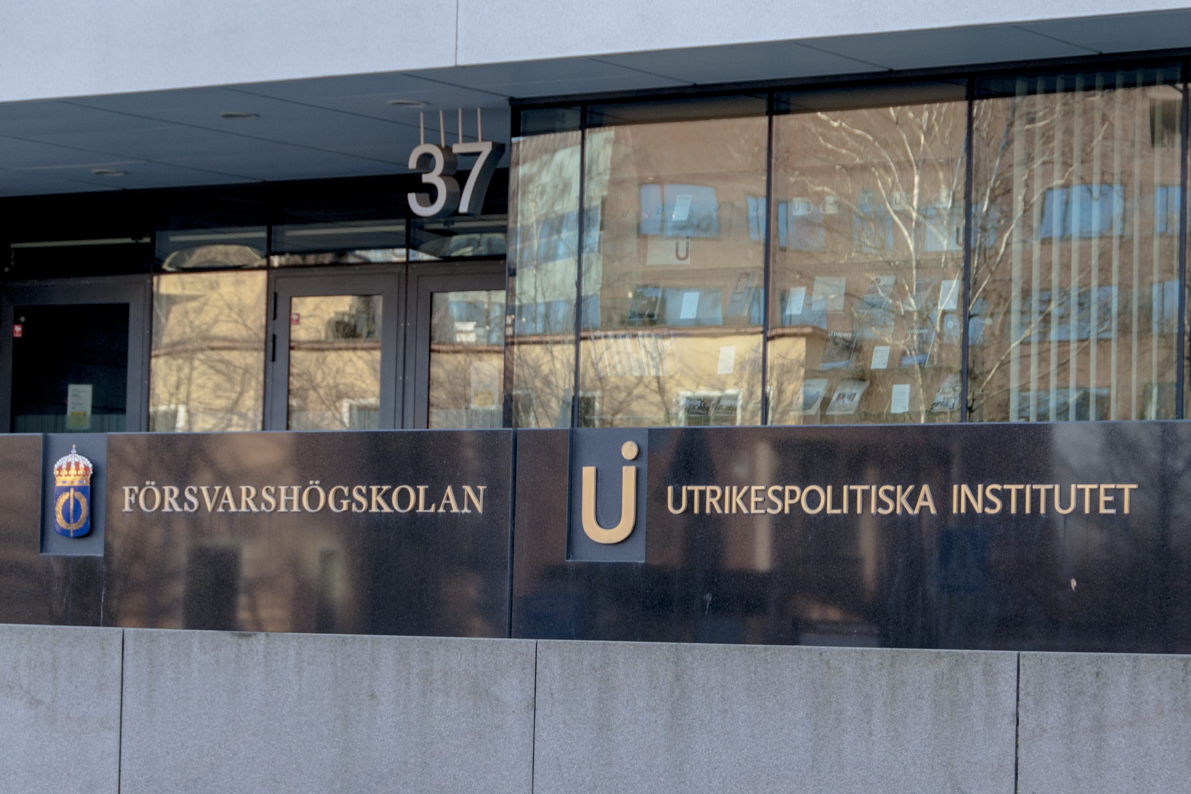 Försvarshögskolan och Utrikespolitiska institutet. Drottning Kristinas väg 37, Stockholm. Byggnadsår 2005. Berg Arkitekter